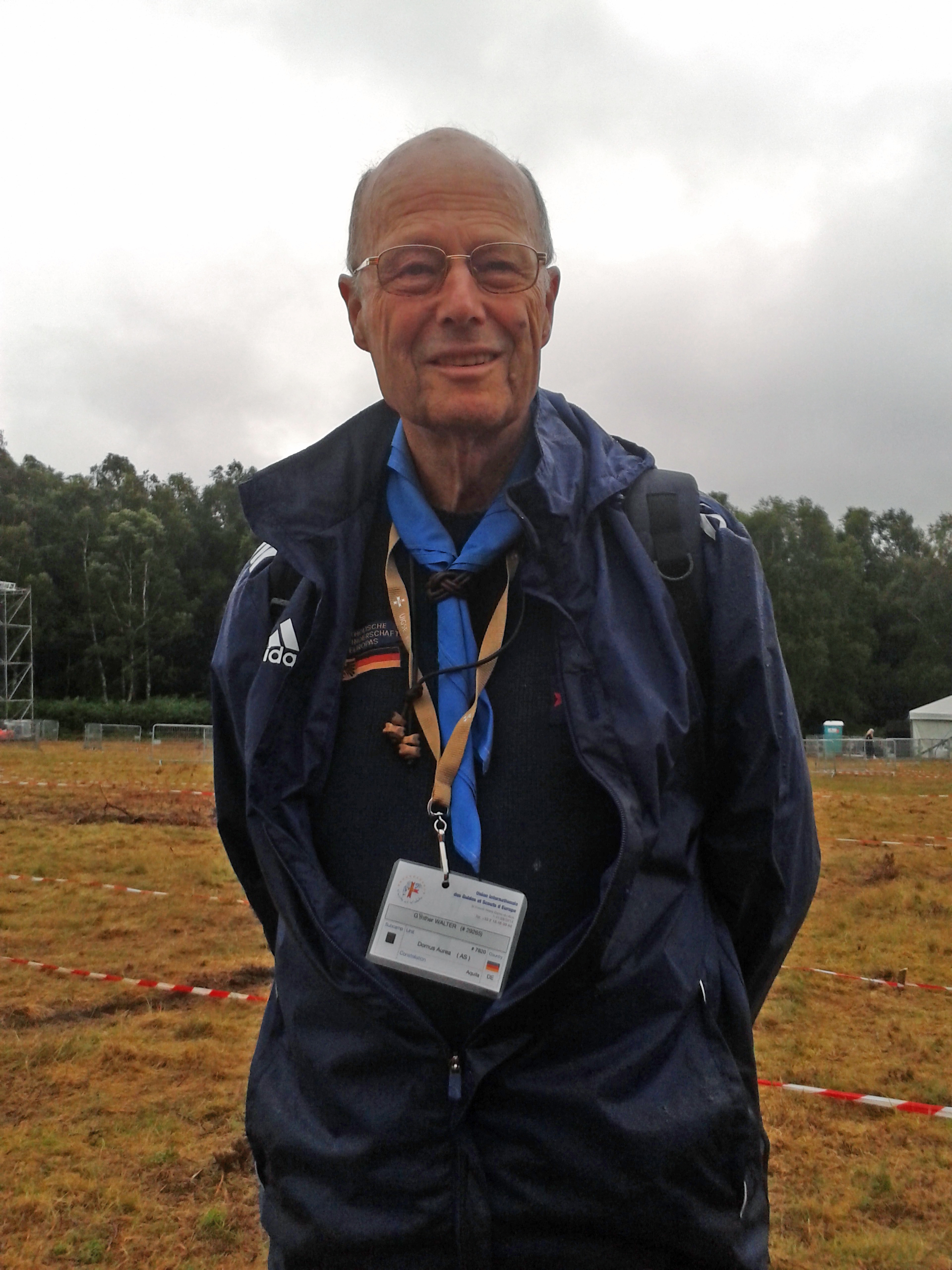 Gunther Walter, cofondateur de la Katholische Pfadfinderschaft Europas , à l'Eurojam en 2014